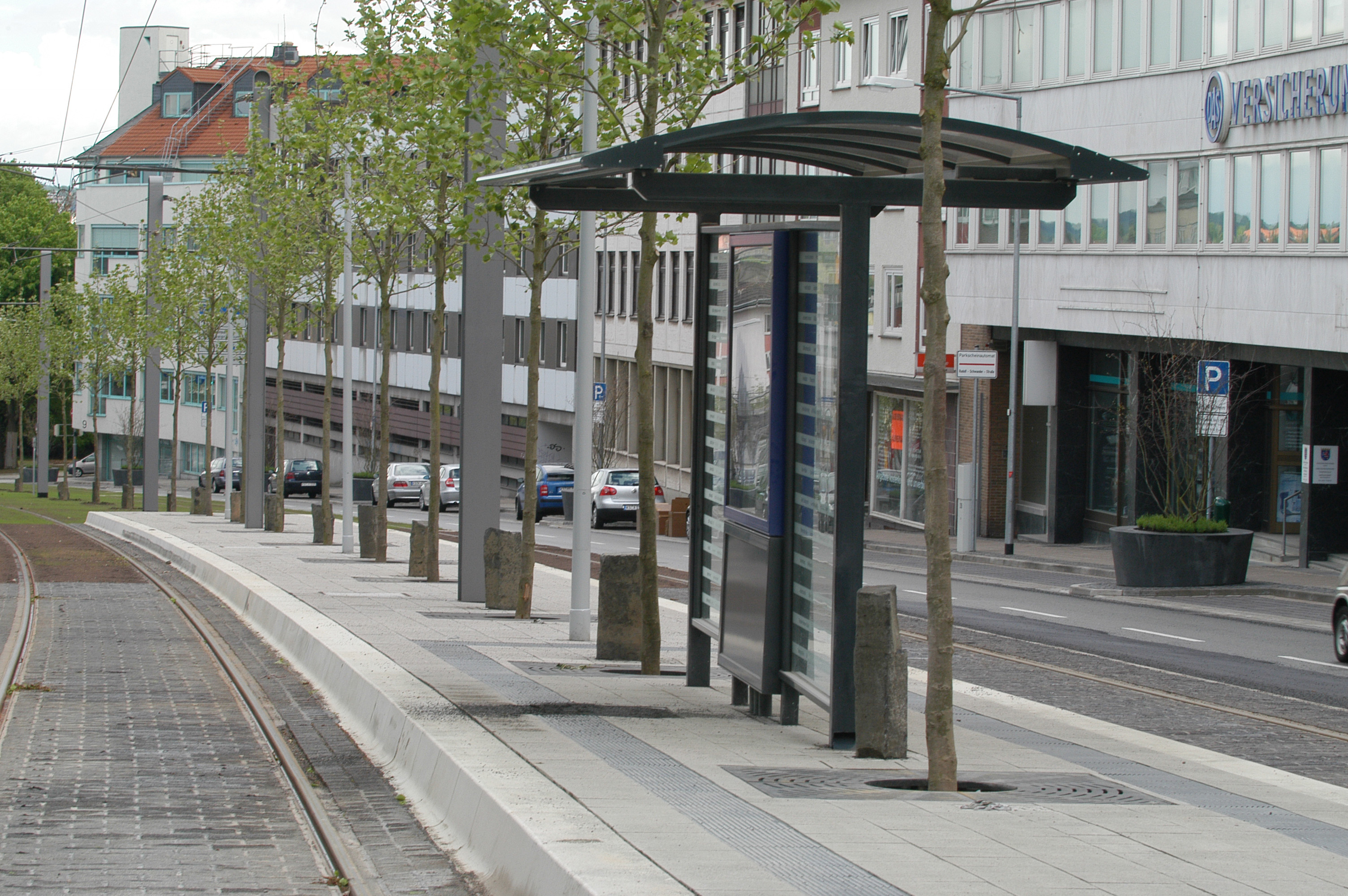 Haltestelle Rudolf-Schwander-Straße (Aufnahme: 08.05.05) Selbst fotografiert